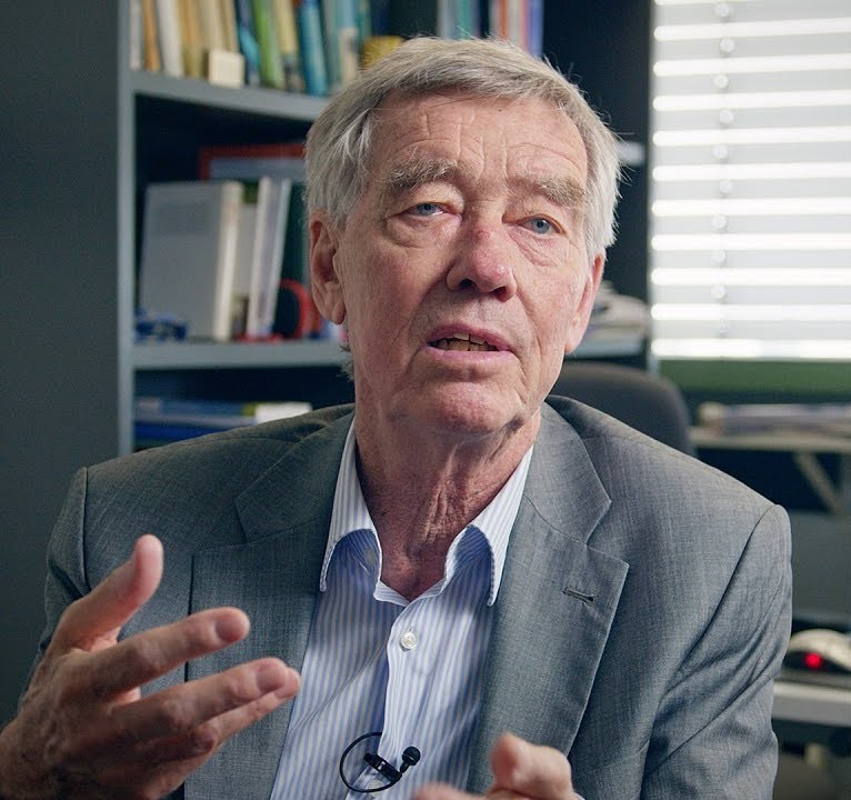 Riechen kann man nicht nur mit der Nase. Rezeptoren für Gerüche sind im menschlichen Körper auch im Herzen – und sogar im Darm. Hanns Hatt, Professor für Zellphysiologie an der Ruhr-Universität Bochum, will herausfinden, wie diese Sensoren funktionieren. Wie beeinflussen Düfte unser Leben – und wie kann man es sich mit ihnen angenehmer machen? Der Stifterverband und die Deutsche Forschungsgemeinschaft haben Hanns Hatt im Jahr 2010 mit dem Communicator-Preis ausgezeichnet. Weitere Videos aus der "Forschergestalten"-Reihe: Der Moorkundler Hans Joosten Die Meeresforscherin Antje Boetius Der Schmerzmediziner Boris Zernikow Jede Woche neu beim Stifterverband: Die Zukunftsmacher und ihre Visionen für Bildung und Ausbildung, Forschung und Technik Ein Film von Damian W. Gorczany und Stoyan Radoslavov Motion Grafik: Johannes LDC Guerreiro Musik: Lubomir Brashnenkov Dieses Video steht unter der CC-Lizenz CC BY-NC-SA 4.0 Namensnennung - Nicht-kommerziell - Weitergabe unter gleichen Bedingungen 4.0 International